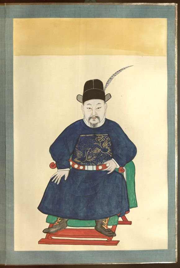 阿良阿胡，丽江土司。